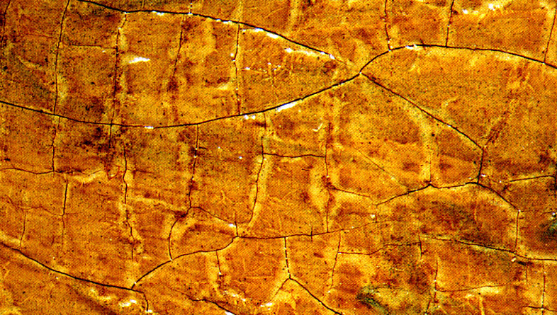 Der ungewöhnliche Firnisriss und die starke Bräunung des Abschlussfirnisses deuten darauf hin, dass im Firnis ein trocknendes enthalten ist.